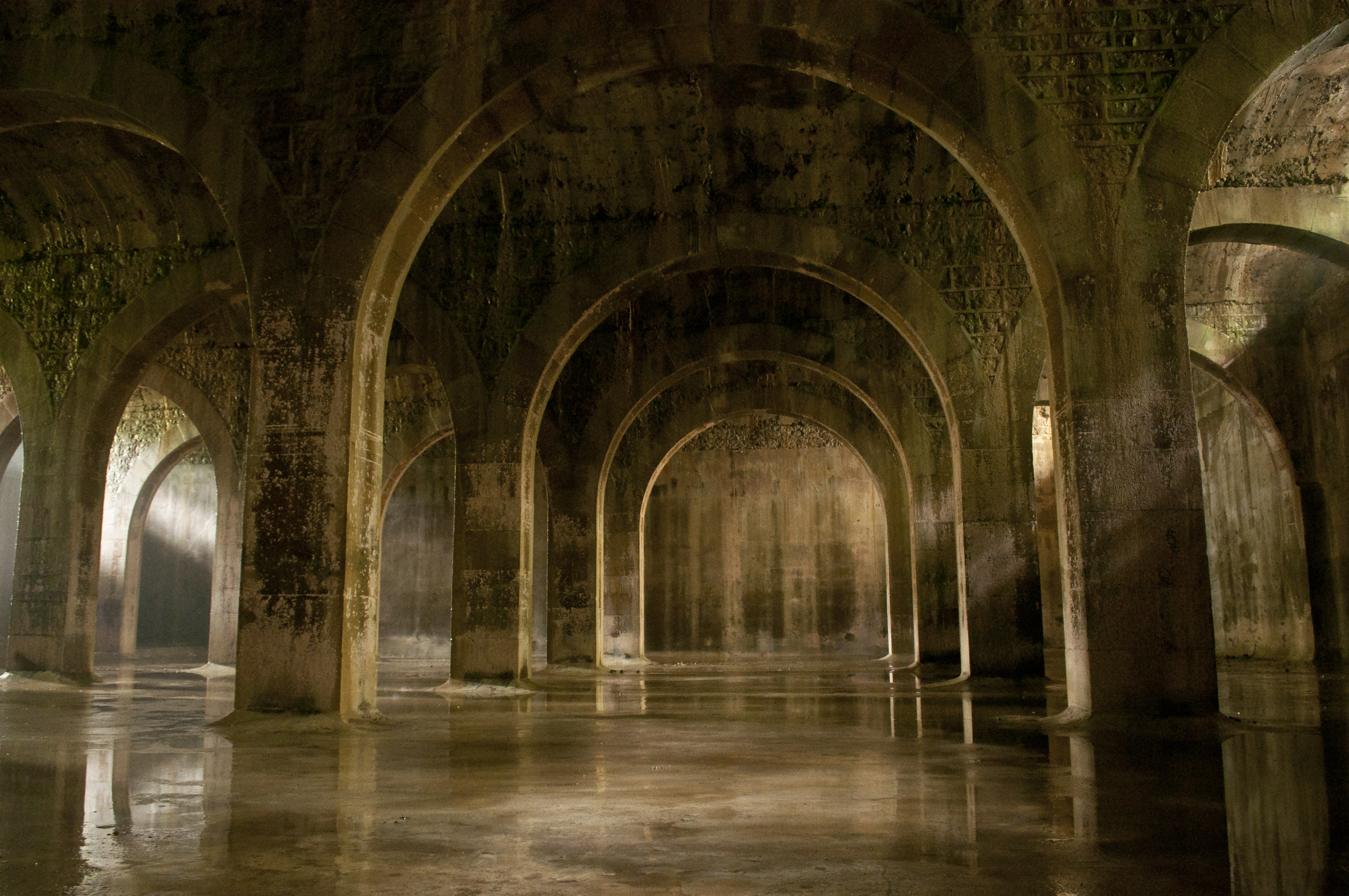 Buskando ur-biltegia. Donostiako Ulia auzoan. Egilea: Lumina Nocte